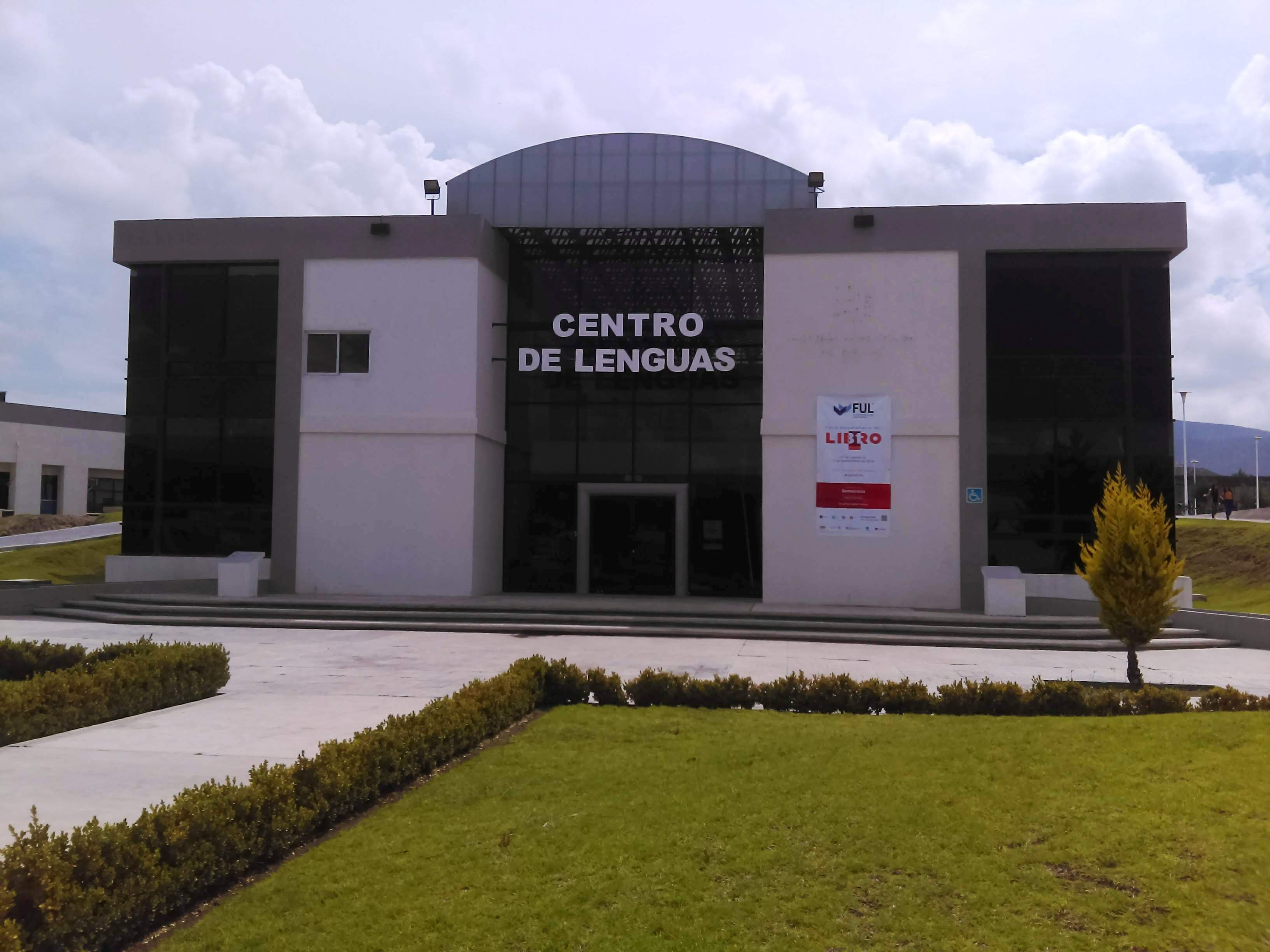 Ciudad del Conocimiento de la UAEH.